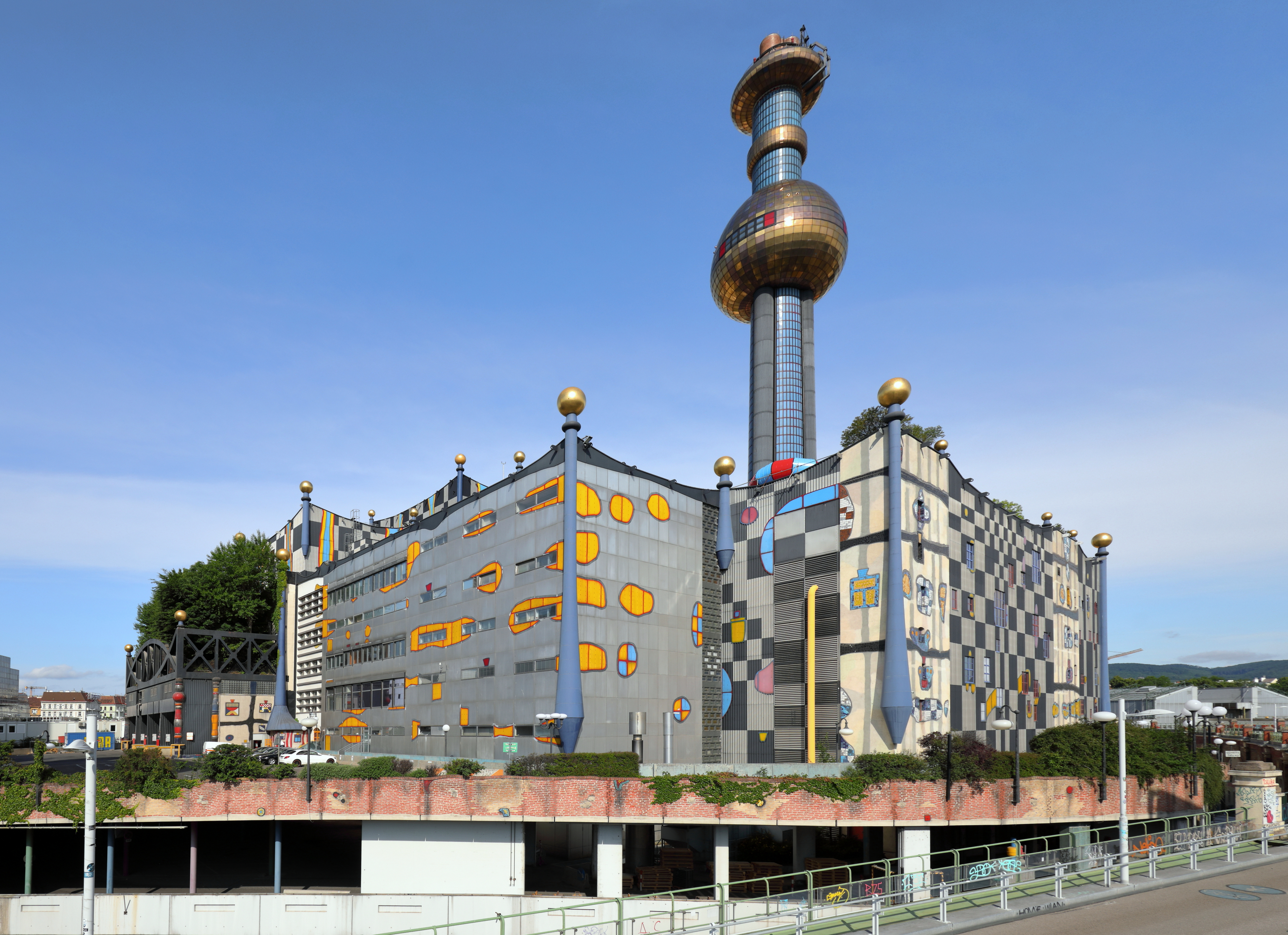 Ostsüdostansicht der Müllverbrennungsanlage in der Spittelau, ein Ortsteil im 9. Wiener Gemeindebezirk Alsergrund.Die Anlage wurde von 1966/69 bis 1972 nach Plänen von Architekt Prof. Josef Becvar und dem Statiker Dr. techn. Adolf Lukele durch die Simmering-Graz-Pauker AG errichtet. Am 15. Mai 1987 brannte die Anlage ab. Im Zuge des Wiederaufbaues wurde der Künstler Friedensreich Hundertwasser um 88 Mio. Schilling beauftragt, die Fassade und den Schlot zu gestalten. Am 16. Juli 1991 wurde die 113 Tonnen schwere Stahlkugel auf den 126 m hohen Schlot aufgezogen.Von 2012 bis 2015 erfolgte eine Generalsanierung. Seitdem hat die Anlage folgende technische Daten: Pro Jahr werden rd. 250.000 Tonnen Müll verbrannt (~ 30 t/h), dabei entstehen 120.000 MWh Strom, 500.000 MWh Fernwärme, 6.000 t Eisenschrott sowie 60.000 t Schlacke, Asche und Filterkuchen.